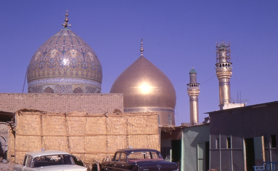 dômes et minarets de Samarra en 1970